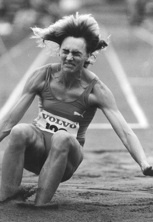 Heike Drechsler ADN-Friedrich Gahlbeck 19.8.1-90 -Dresden: 41. DDR-Meisterschaften in der Leichtathletik. Beim Weitsprung der Frauen holte sich mit 7,12 Metern Heike Drechsler vom SC Motor Jena den letzten DDR-Titel in dieser Disziplin. Abgebildete Personen: Drechsler, Heike: Leichtathletin, Weitspringerin, DDR